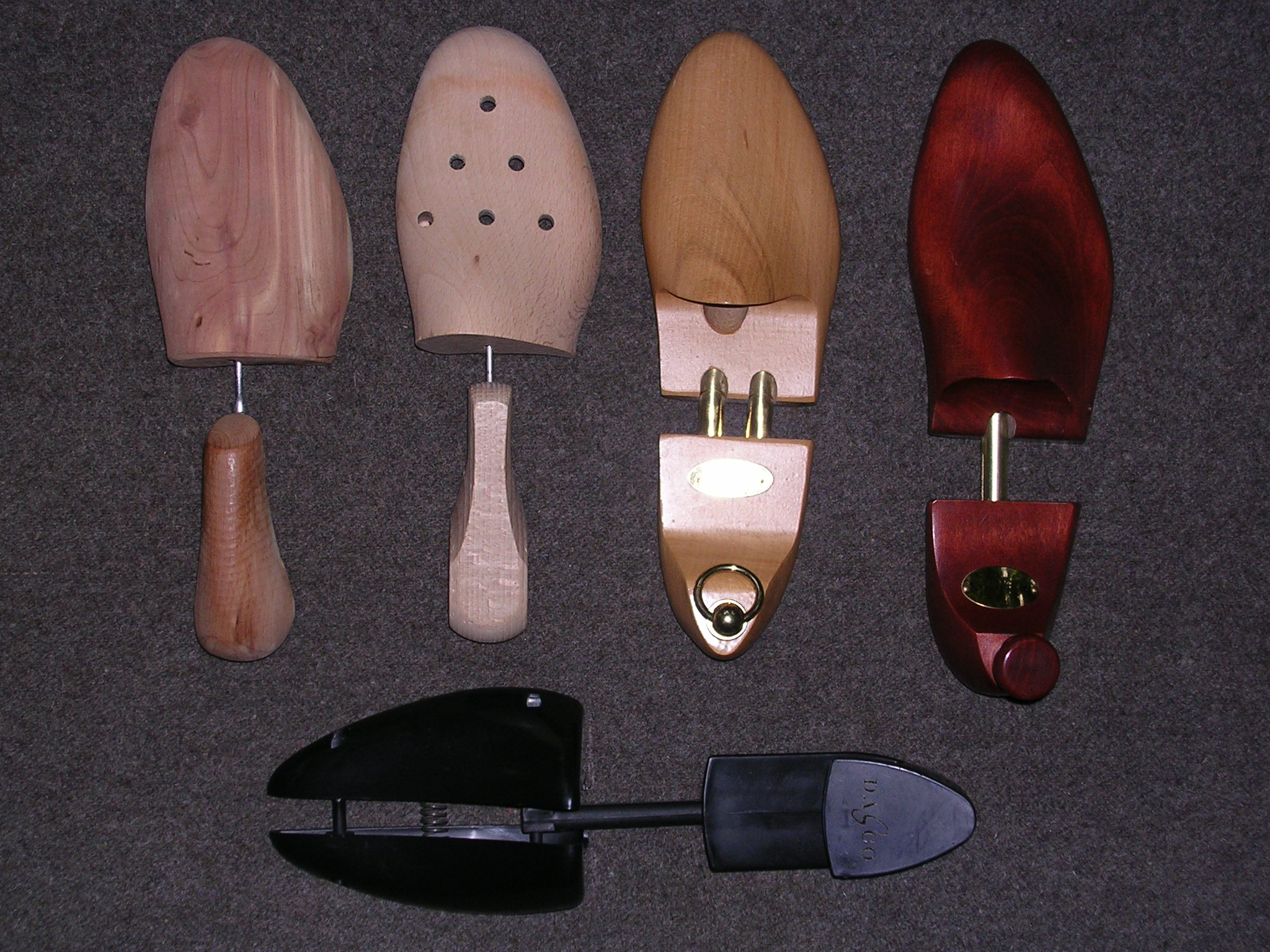 verschiedenen Typen von Schuhspannern